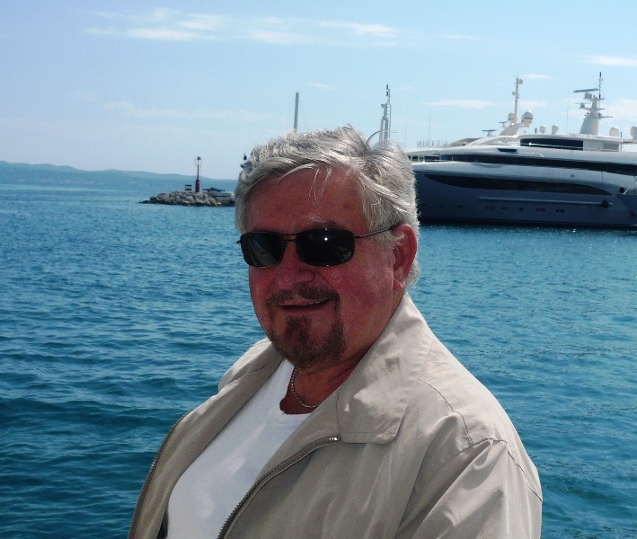 Milan Zelený